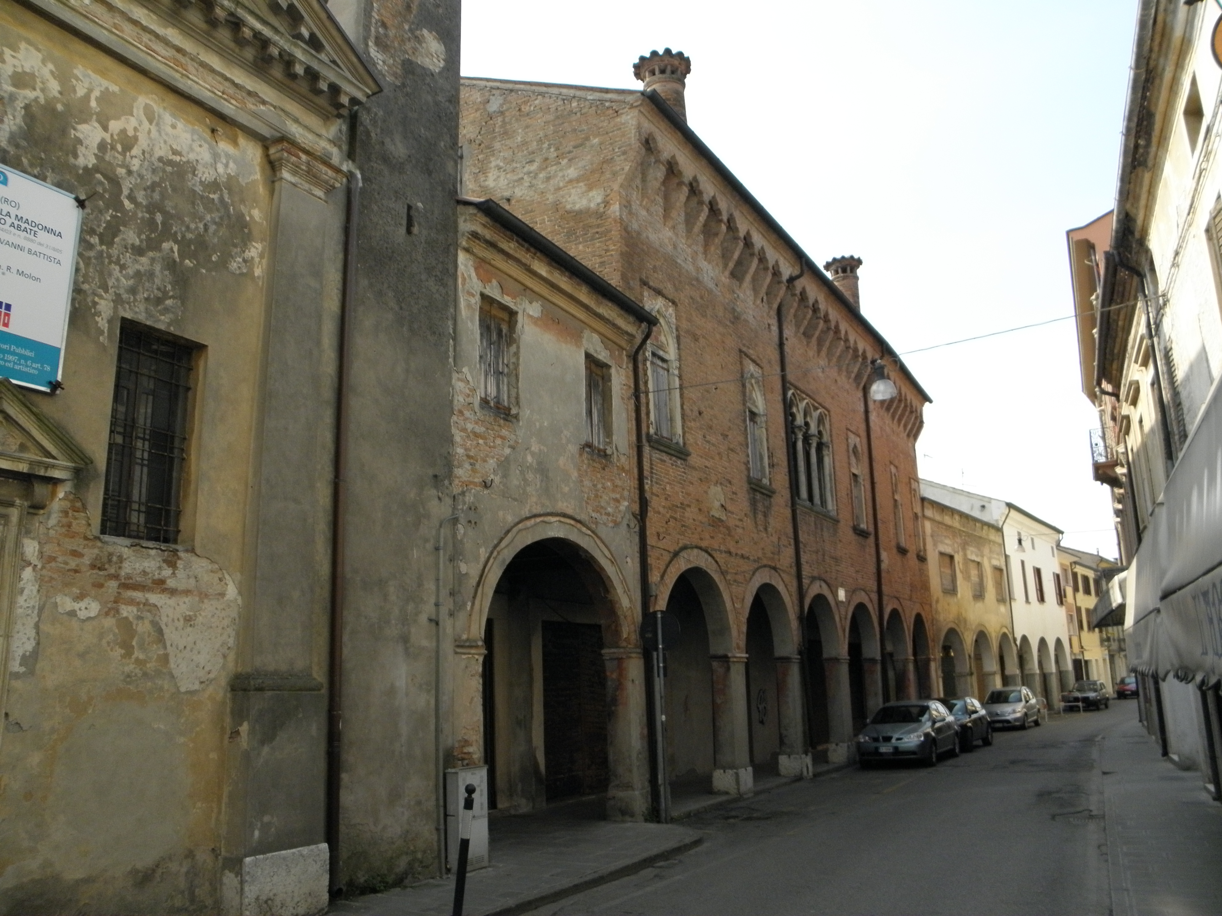 Badia Polesine: Il palazzo (detto popolarmente) degli Estensi costruito attorno al 1430 in stile gotico.